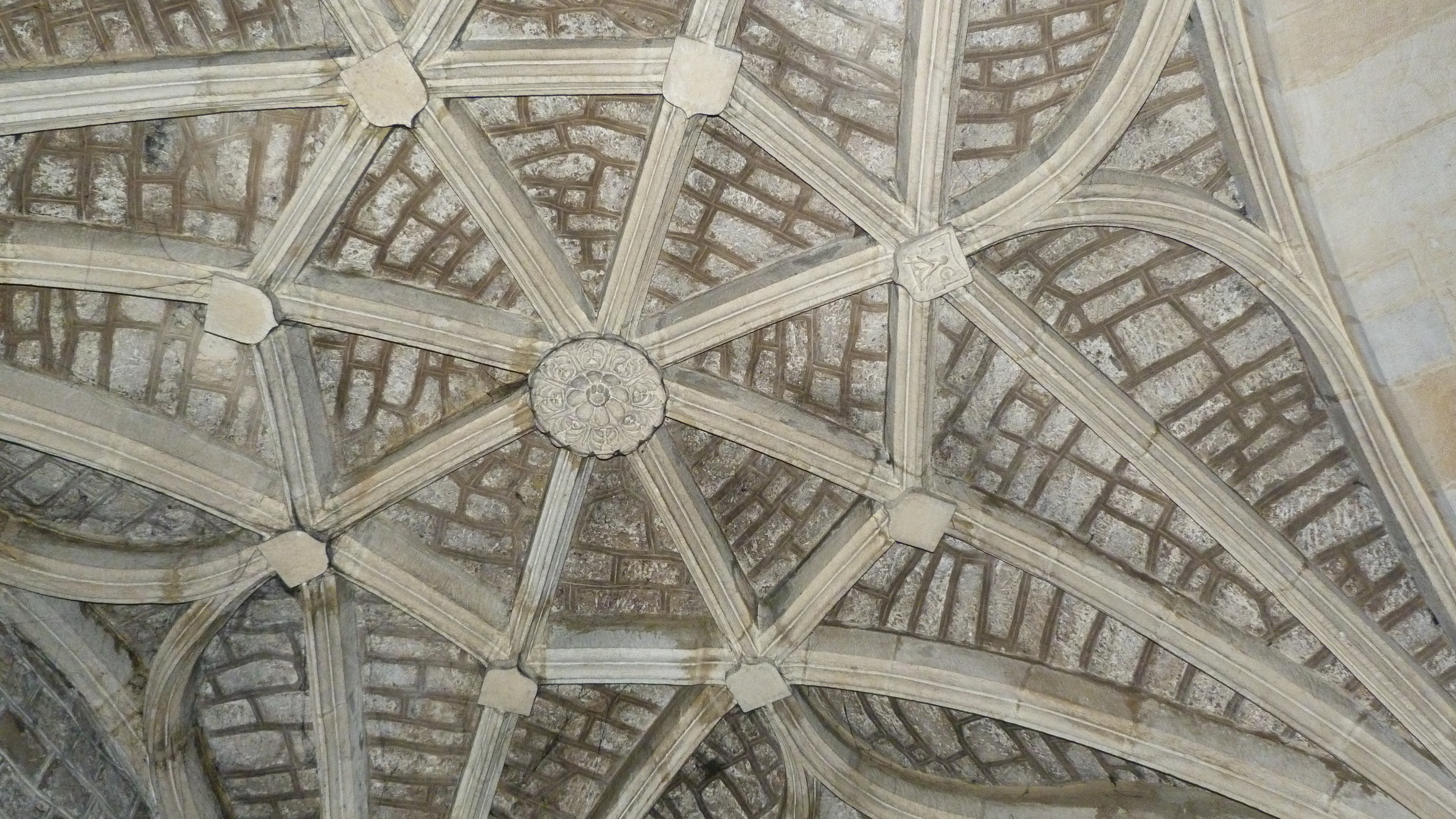 nef voutée d'ogive